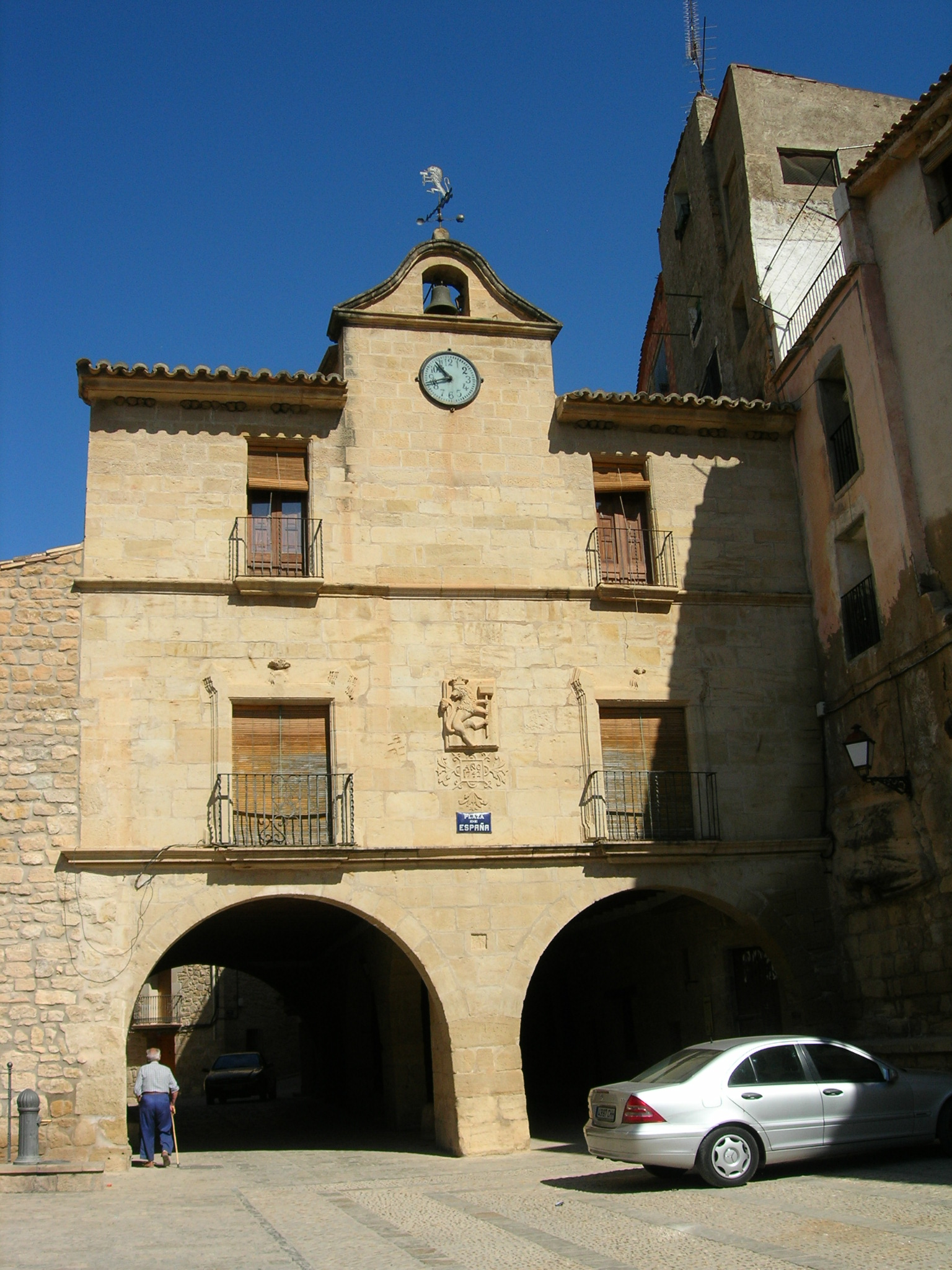 Casa consistorial (Massalió)